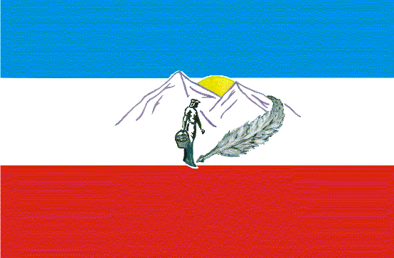 bandera Local